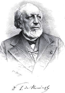 Laurent-Guillaume de Koninck (Louvain, 3 mai 1809-16 juillet 1887) est un paléontologue et chimiste belge.